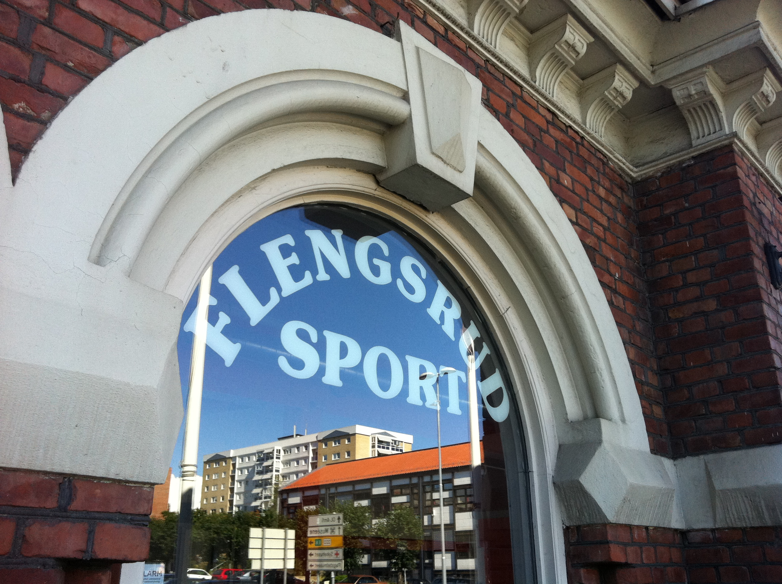 Detalj av Basarbygnignen på Stortorget på Hamar